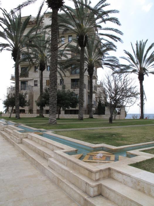 גבעת אנדרומדה היא שכונת מגורים סגורה ויוקרתית ברחוב לואי פסטר ורחוב יפת ביפו. השכונה נמצאת מעל נמל יפו, והכניסה אליה היא מרחוב יפת